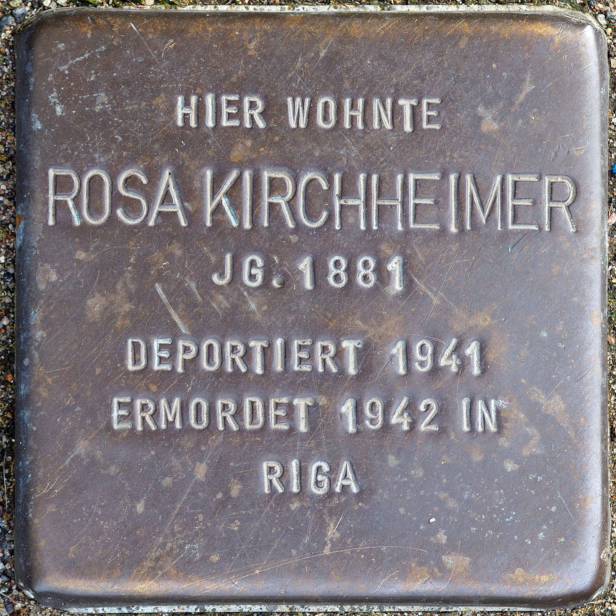 Stolpersteine MG: Kirchheimer, Rosa